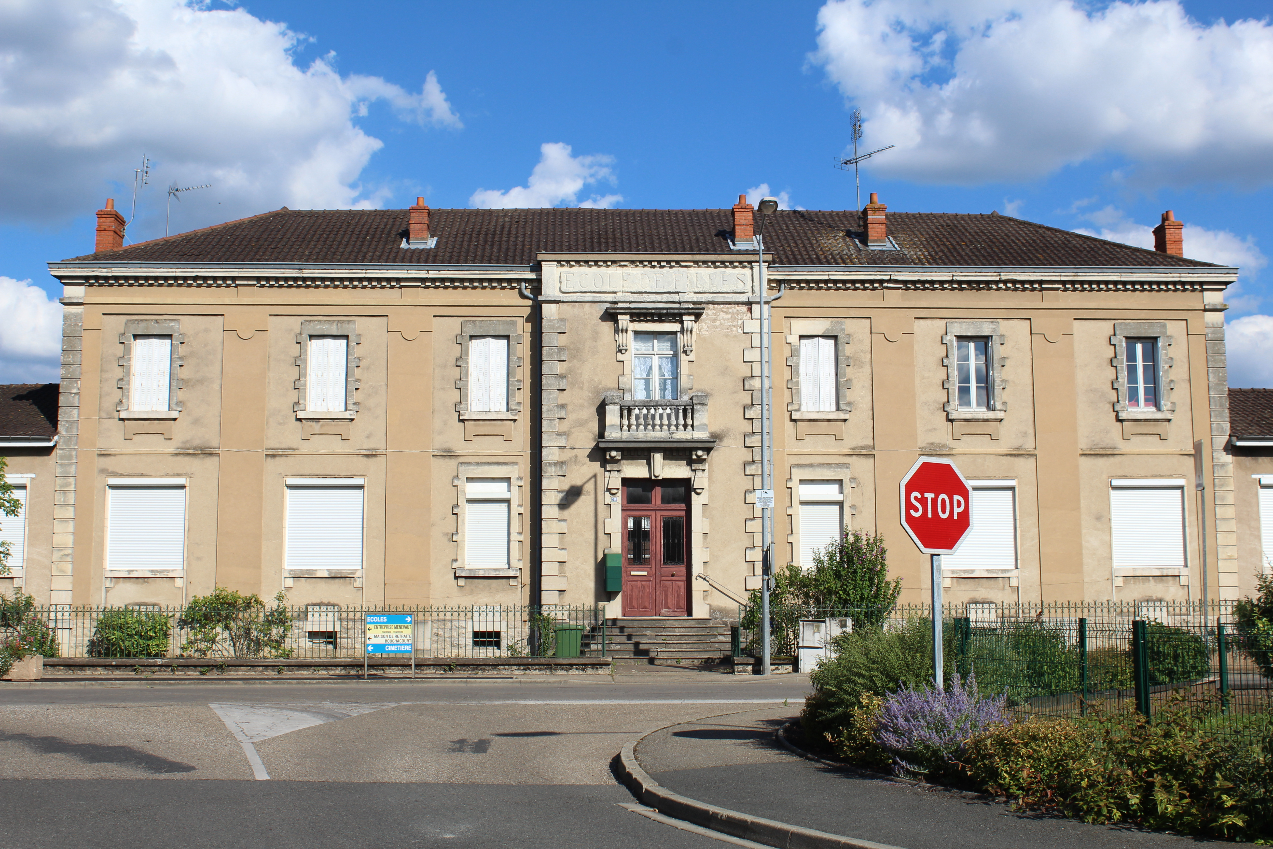 Ancienne école des filles de Saint-Laurent-sur-Saône.